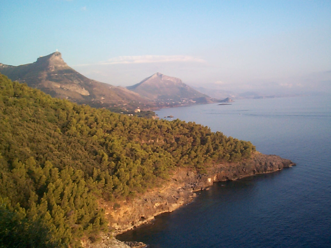 Foto realizzata dall'utente Aldo Iannotti il 23/08/2003 per it.wiki